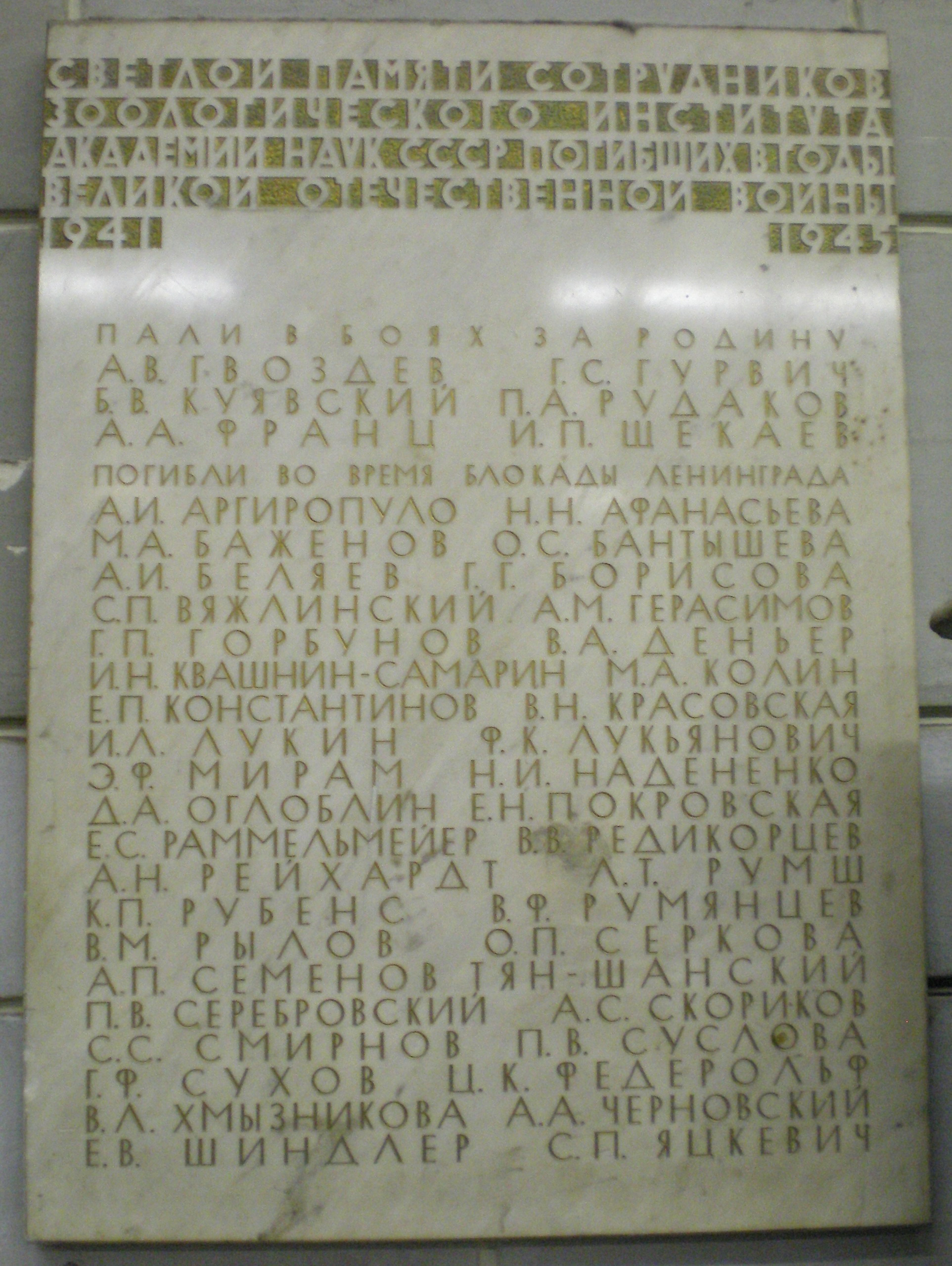 Зоологический музей. Память погибшим в войне и блокаде (особенность перечисления: Учёные без регалий, по алфавиту)